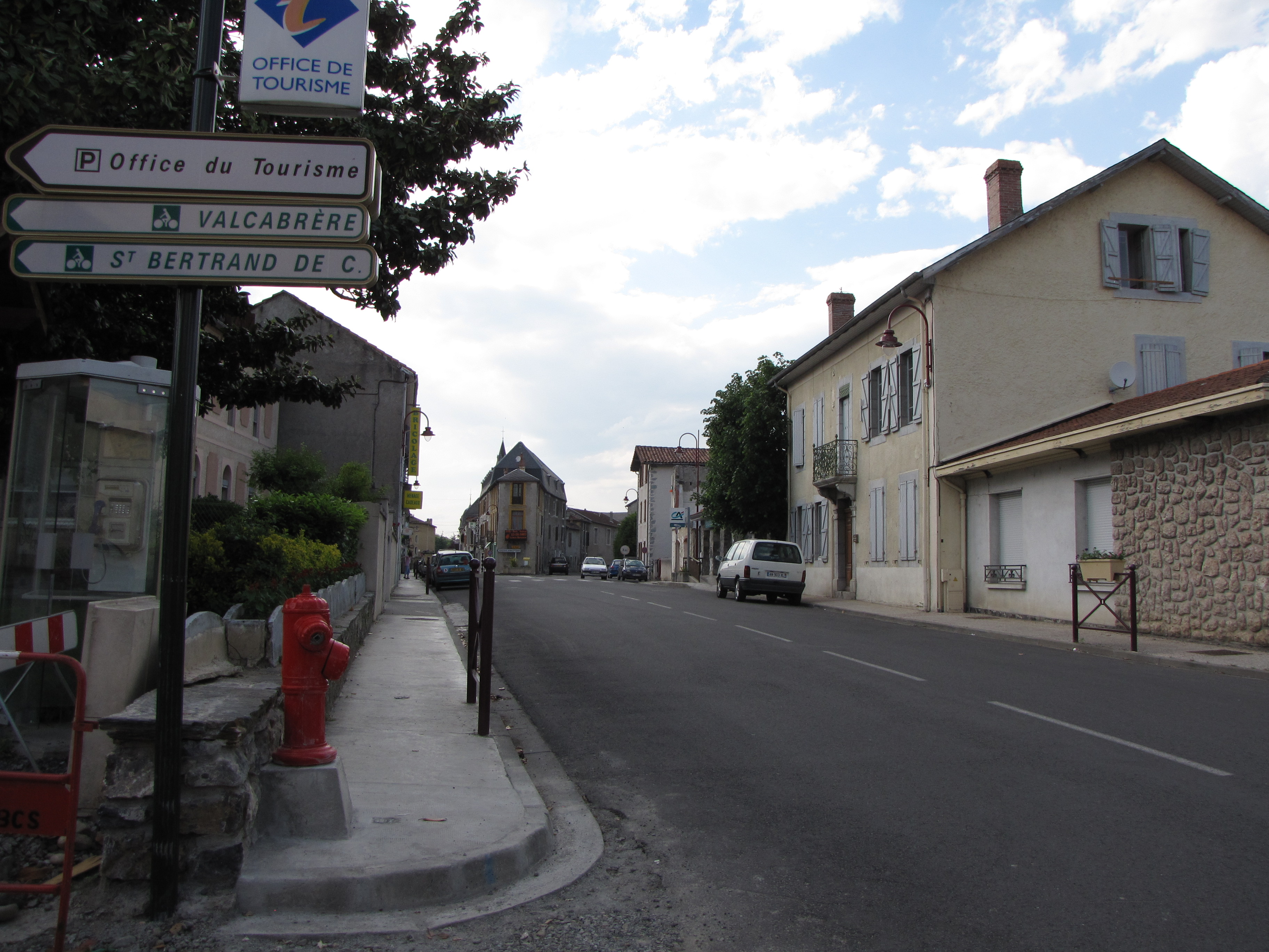 Loures-Barousse